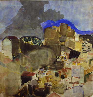 Painting